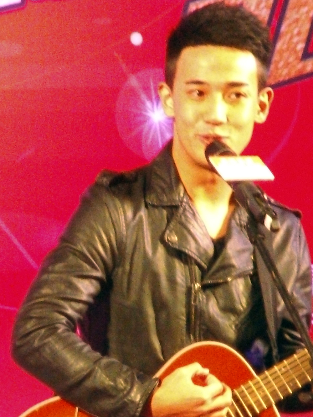 中文（香港）: 李安豪的樣子